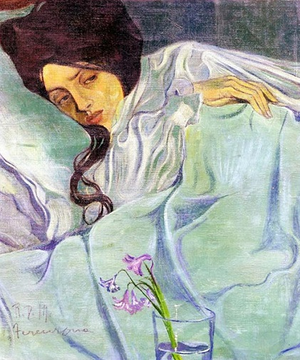 Fanciulla malata, olio su tela